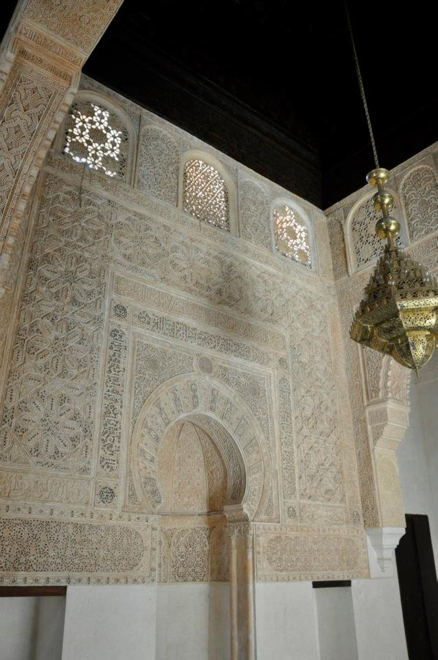 mihrab médersa salé